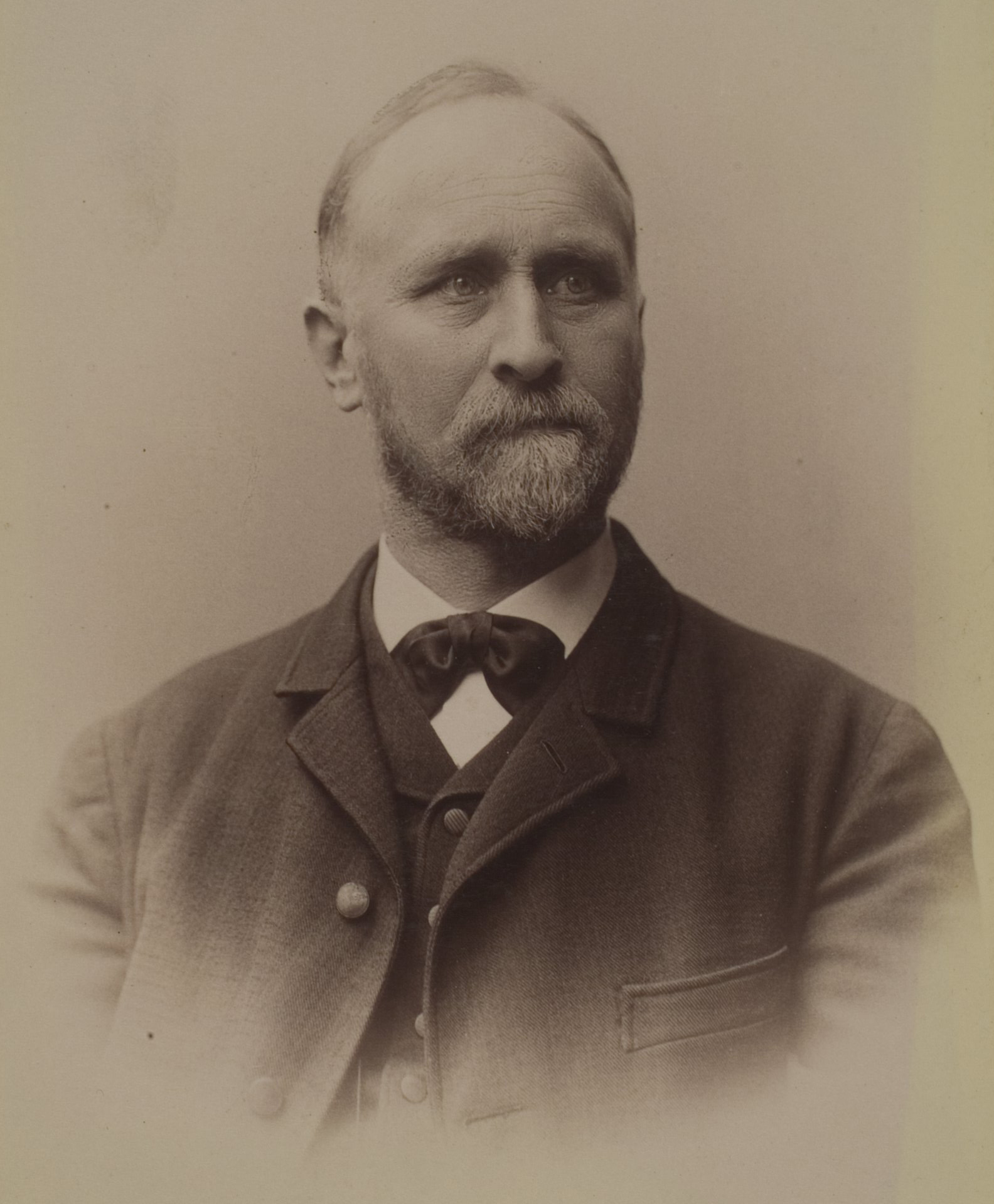 Adolf Schmidt, Geologe und Metallurg, 1881–1913 Professor in Heidelberg, seit 1913 Honorarprofessor in Heidelberg